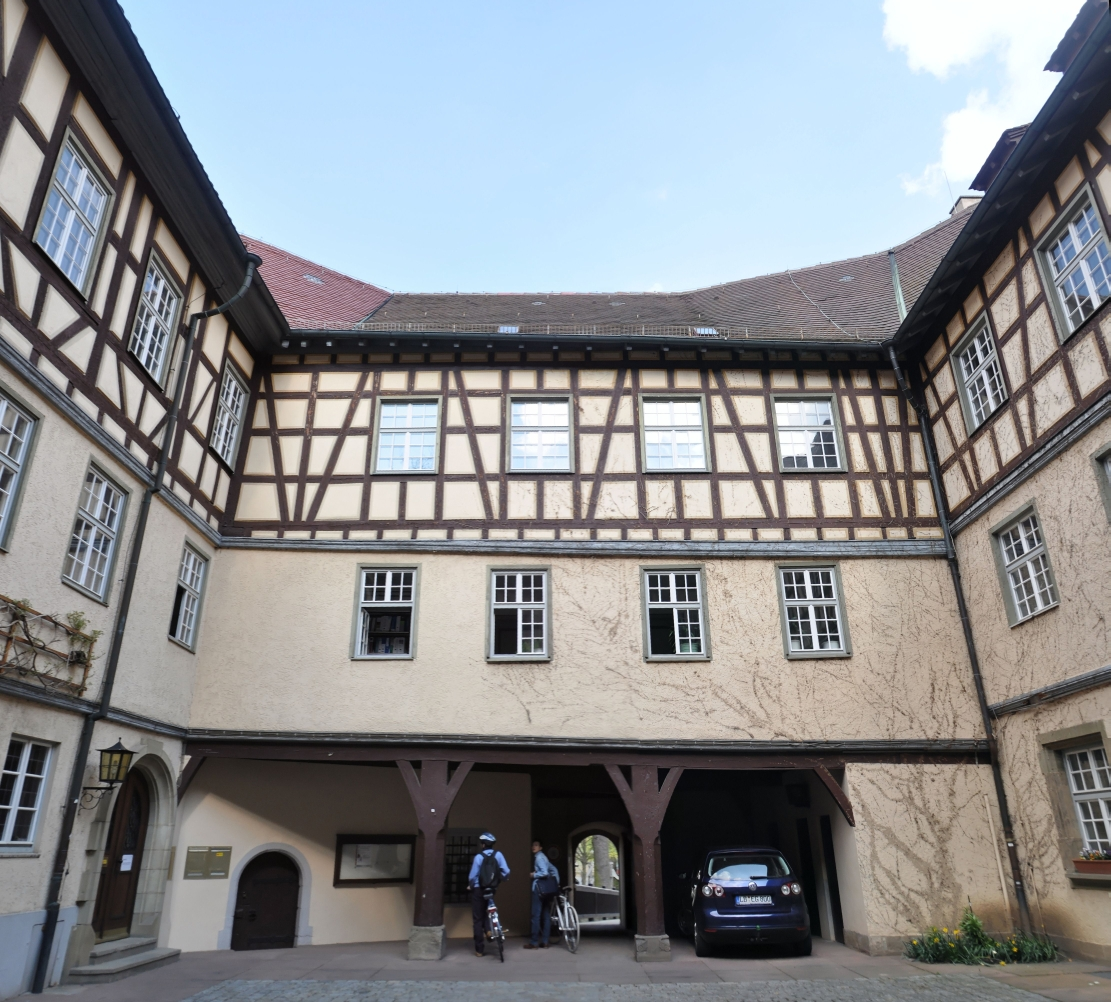 Sachsenheim April 2012